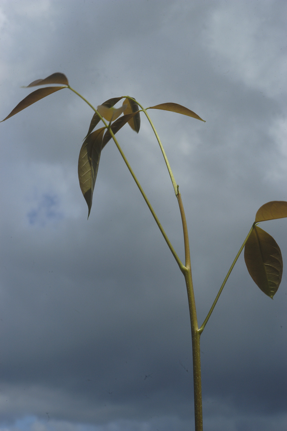 Andiroba; Carapa guianensis, planta jovem